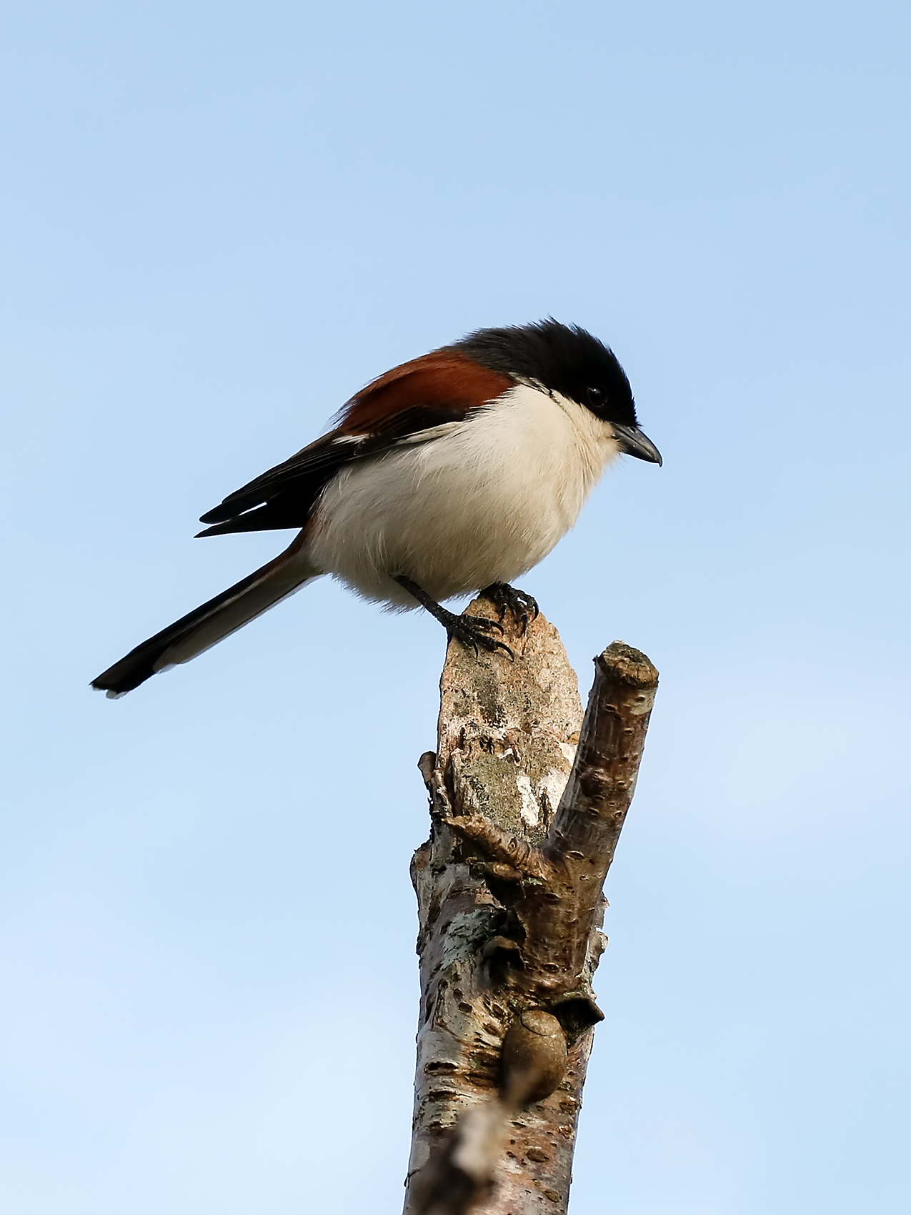 Lanius collurioides nigricapillus - Dalat, Vietnam, 12/01/2018